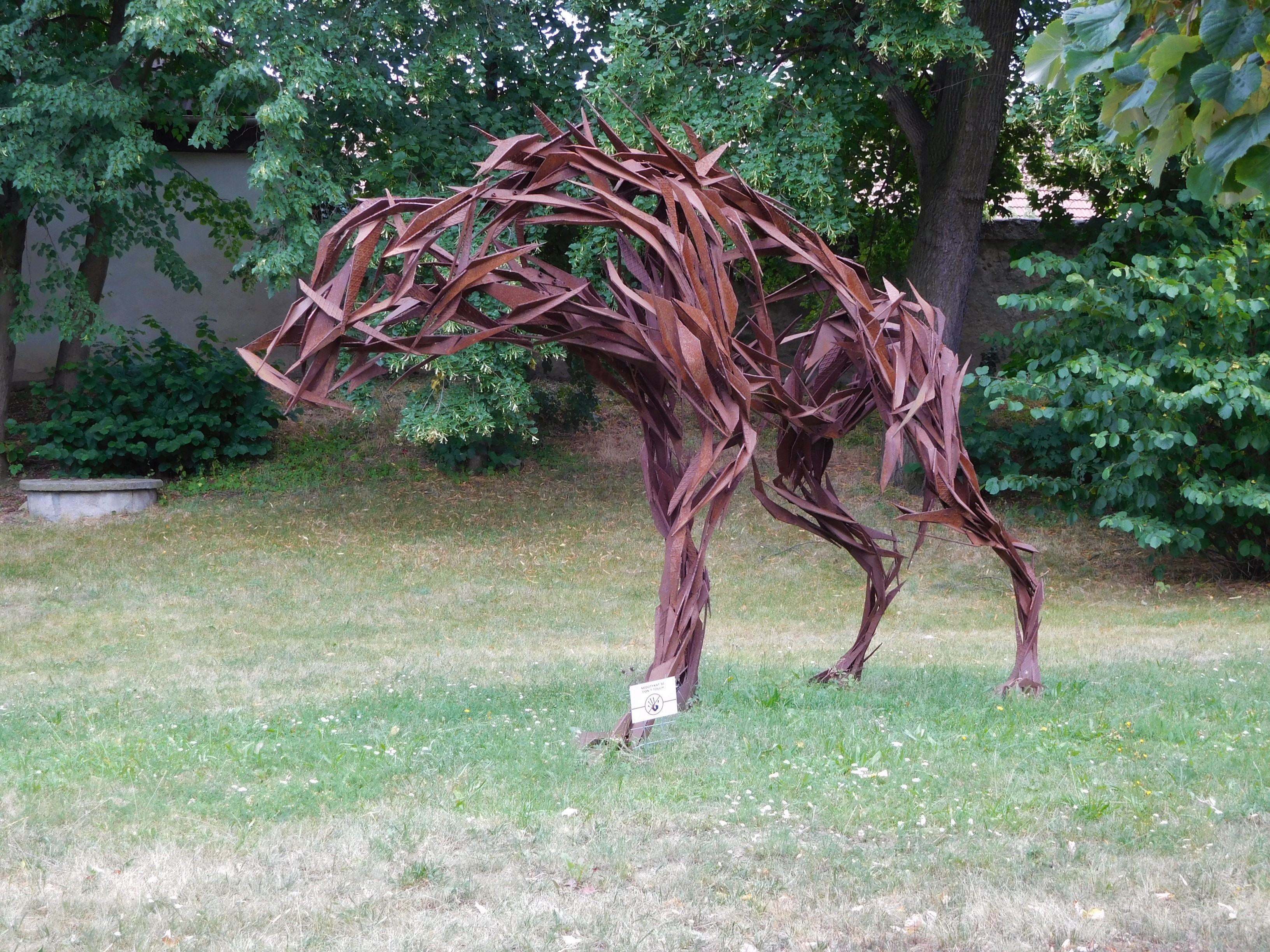 Dolní Břežany - Pražská, plastika (Jan Dostál: Hyena, 2015)